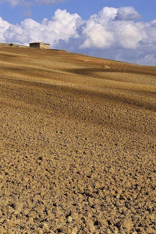 La terra del podere in val d'Orcia,Toscana - Italia.